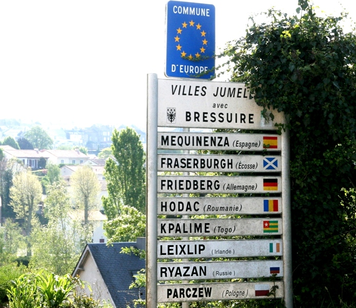 Français